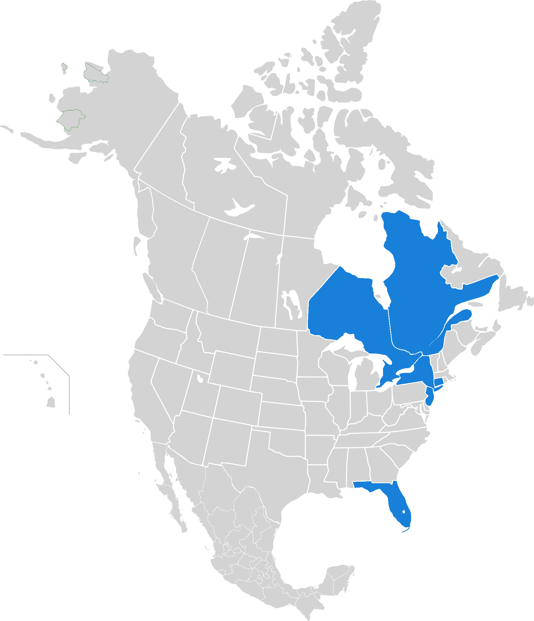 'ndrangheta in Nord America 2017